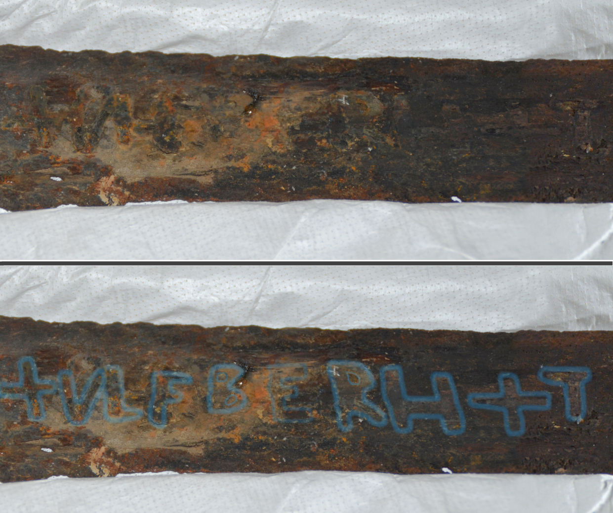 Schwert von Großenwieden, auf der Klinge Aufschrift +VLFBERH+T, unten Umrisse auf dem Foto mit einem Bildbearbeitungsprogramm nachgezeichnet